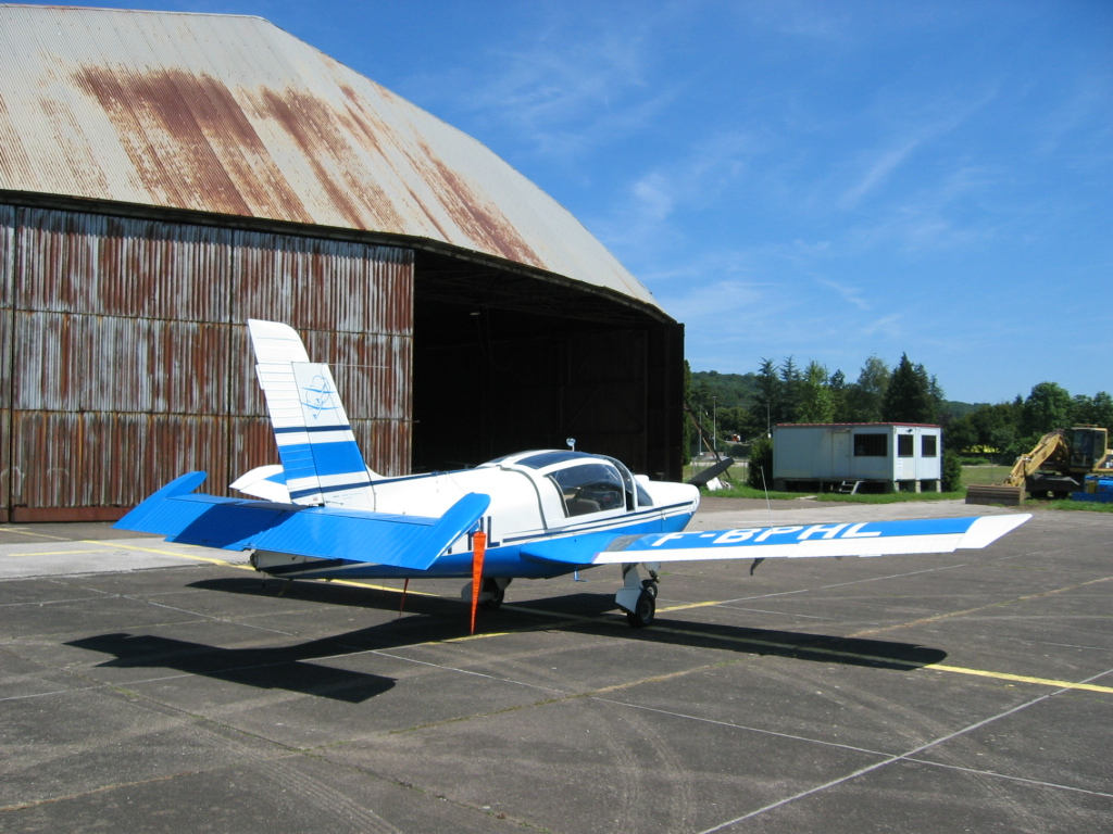 Avion de tourisme Morane-Saulnier Rally MS893 - aéro-club de Besançon Thise